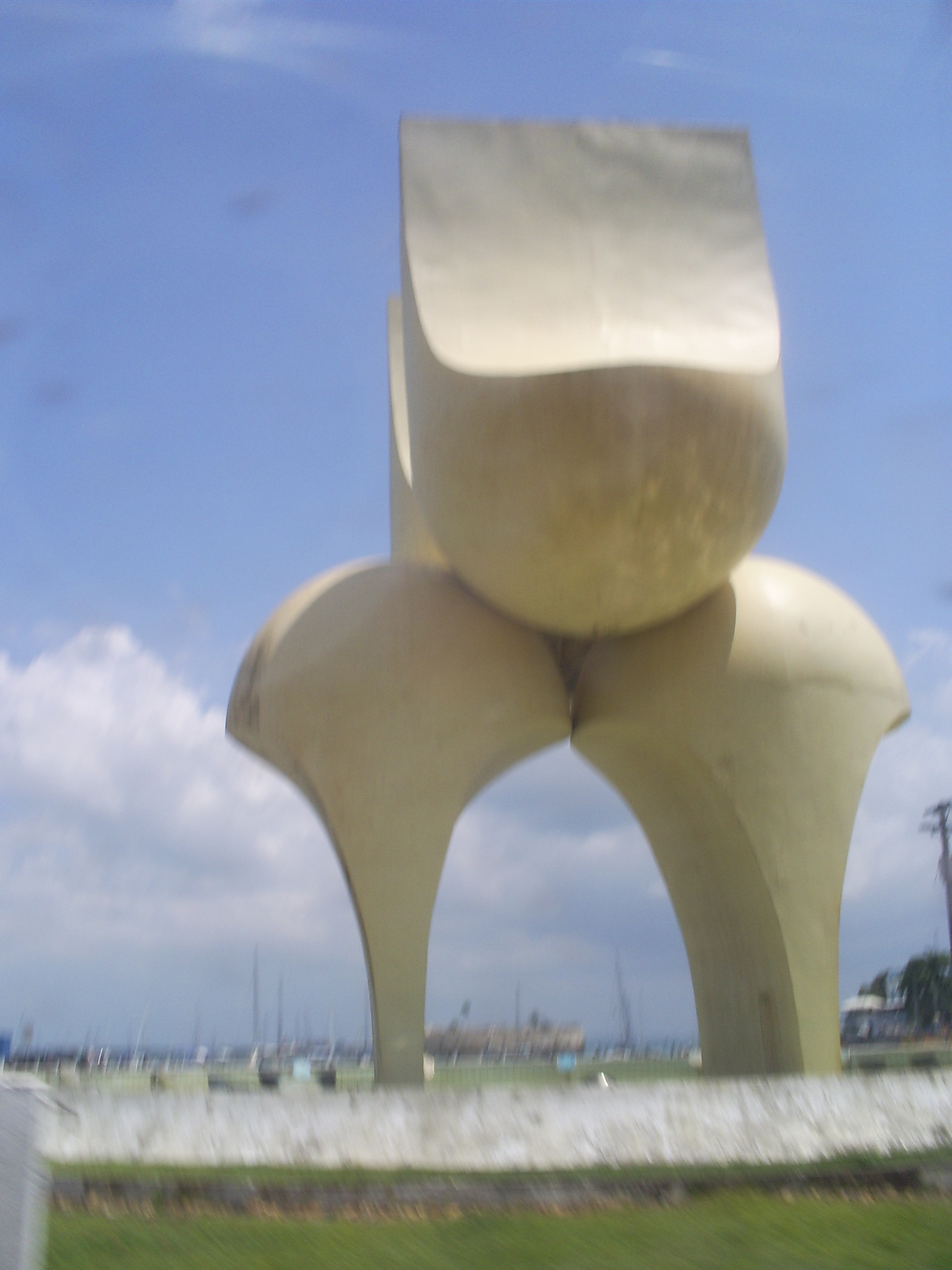 Foto do Monumento à Cidade de Salvador, Salvador, Bahia, Brasil.